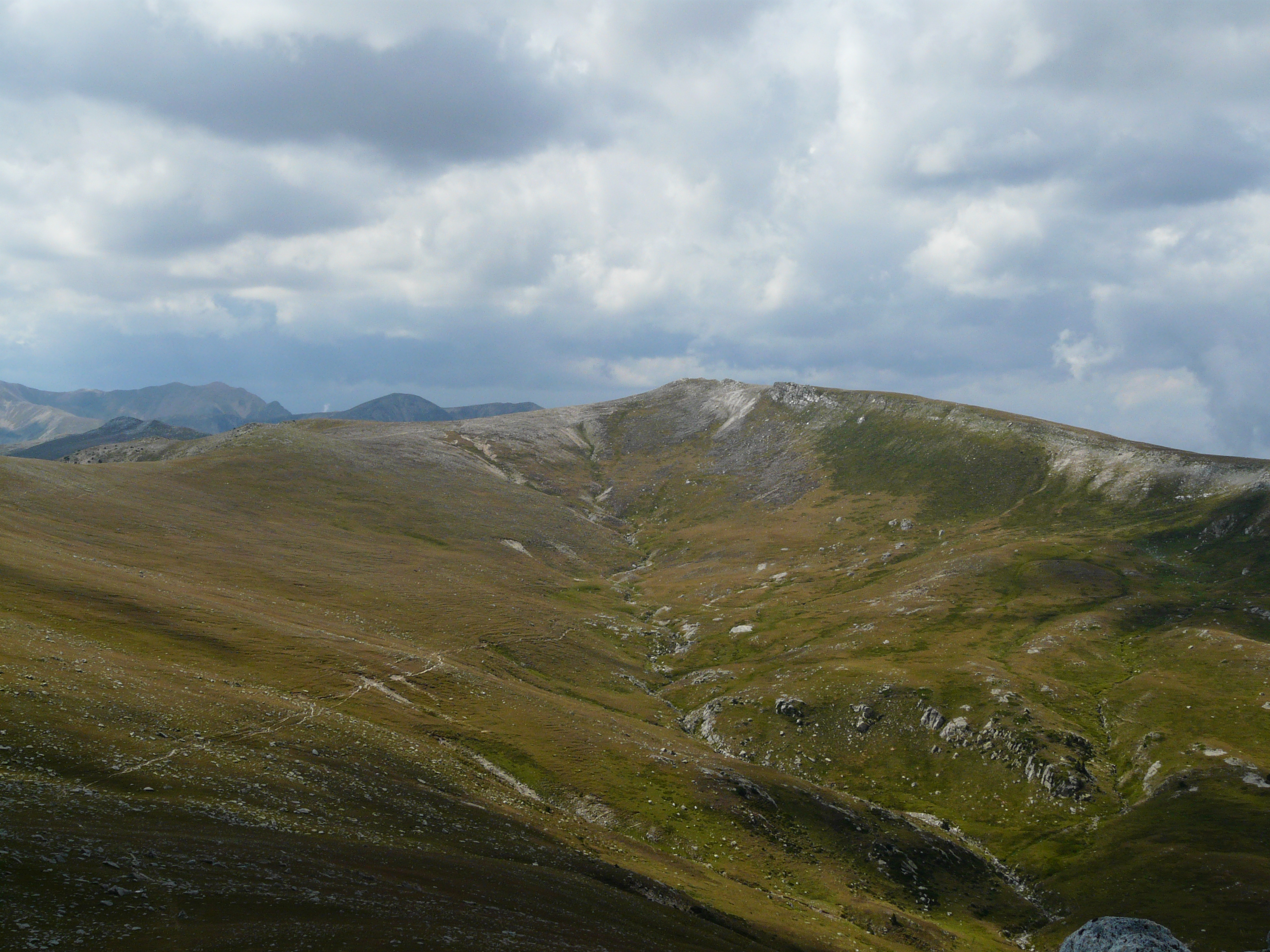 Fotografia presa en una pujada al Costabona des de la Collada Fonda.